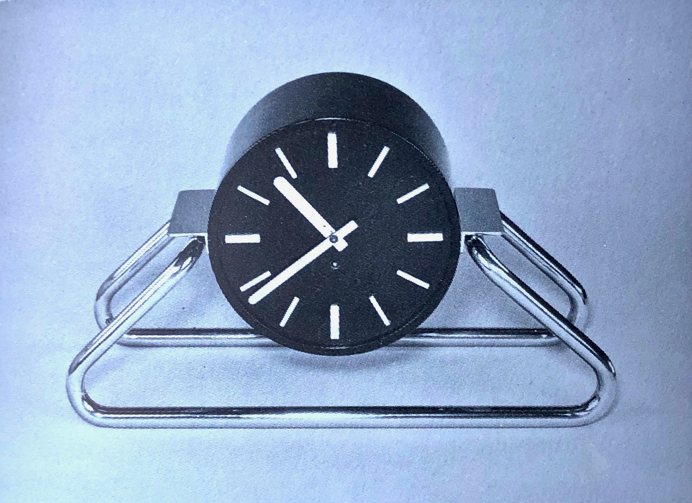 Entwurf einer Uhr durch Erich Dieckmann (1896–1944) für das Büffet im Speisezimmer des Otto Bamberger (1891–1933) in dessen Villa Sonnenhaus in Lichtenfels (Oberfranken). Der Bauhaus-Designer notierte dazu: „Beispiel einer einfachen Zusammenstellung von Körper- und Gliederform. Aus dem runden Zifferblatt entwickelt sich mit Selbstverständlichkeit der zylindrische Uhrkörper, der durch ein leichtes Stahrohrgestell getragen wird“.